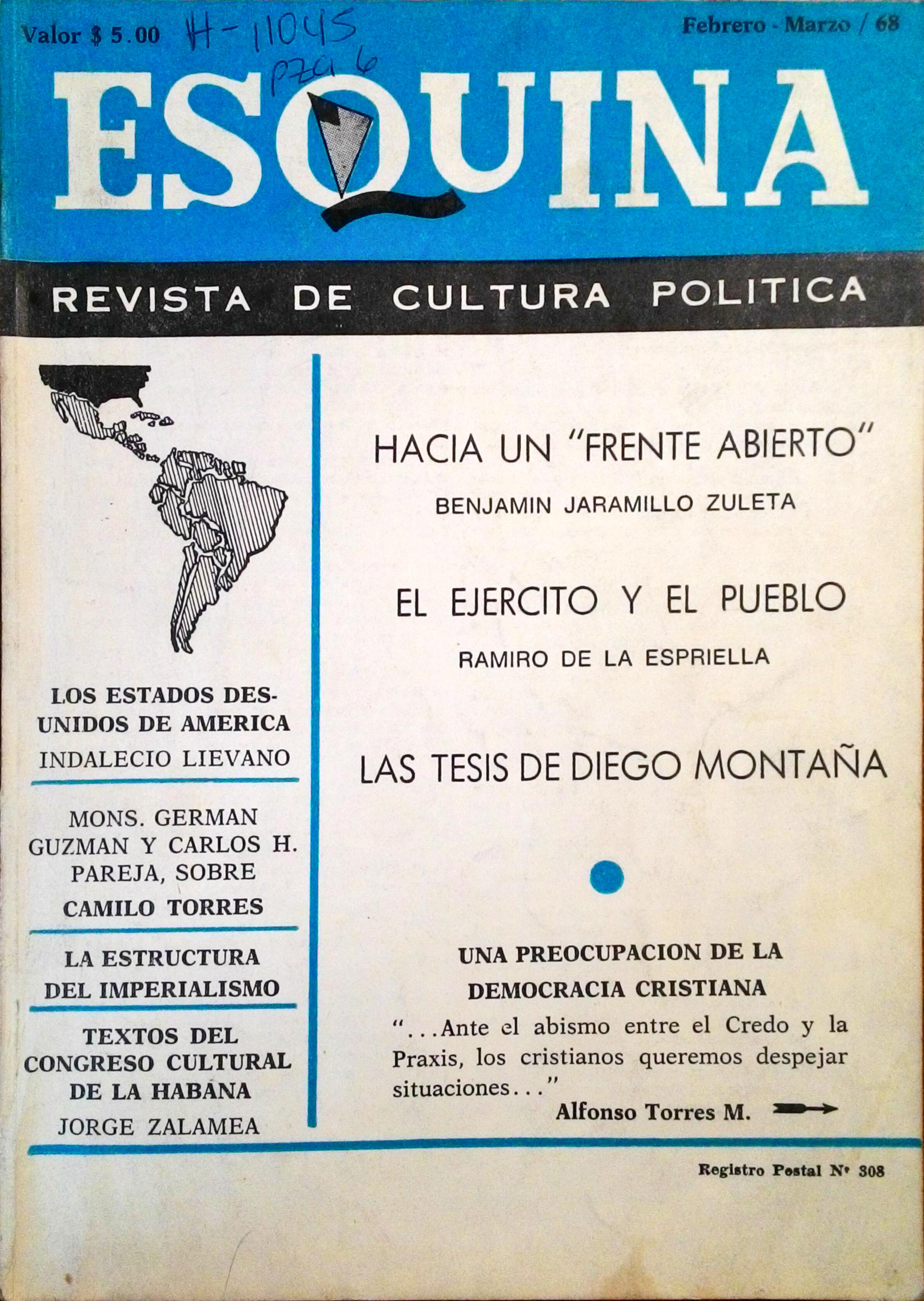 Carátula revista Esquina, febrero-marzo de 1968, Nos. 2 y 3.